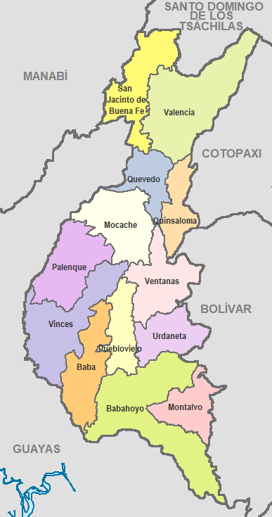 Cantones de Los Ríos Unknown